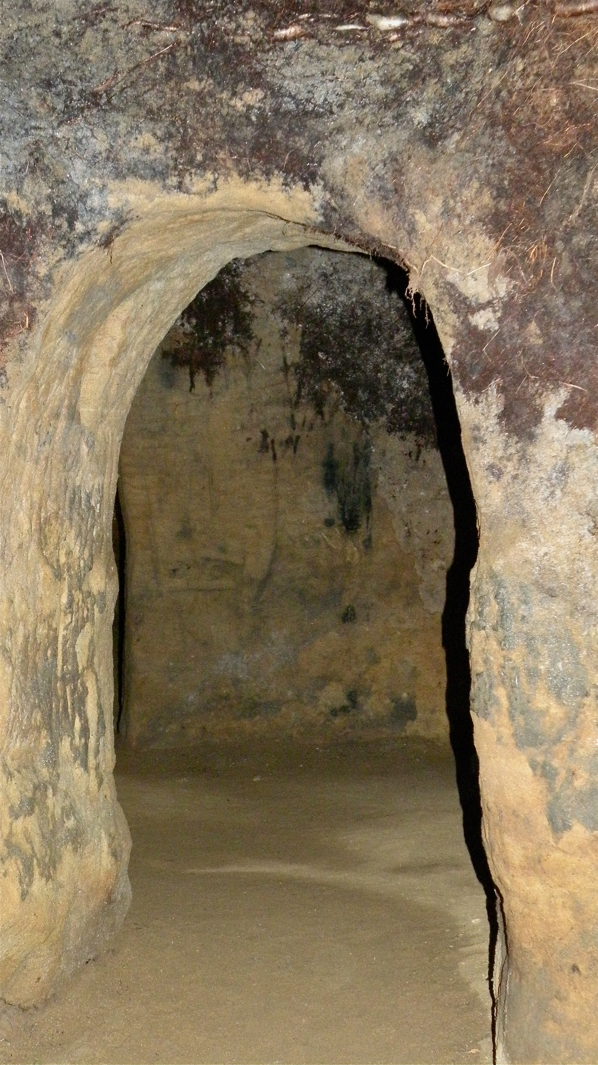 Mühlsteinbruch Scherer, Steinbrecherhaus, Erdstall